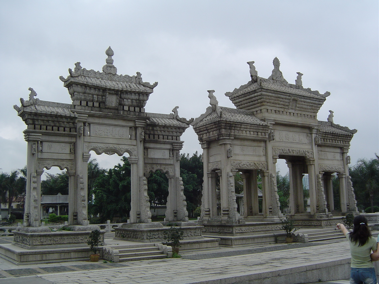 2005 珠海 梅溪牌坊